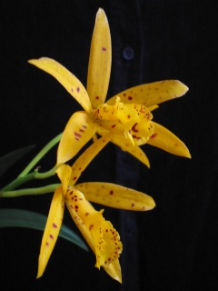 Cattleya hybride